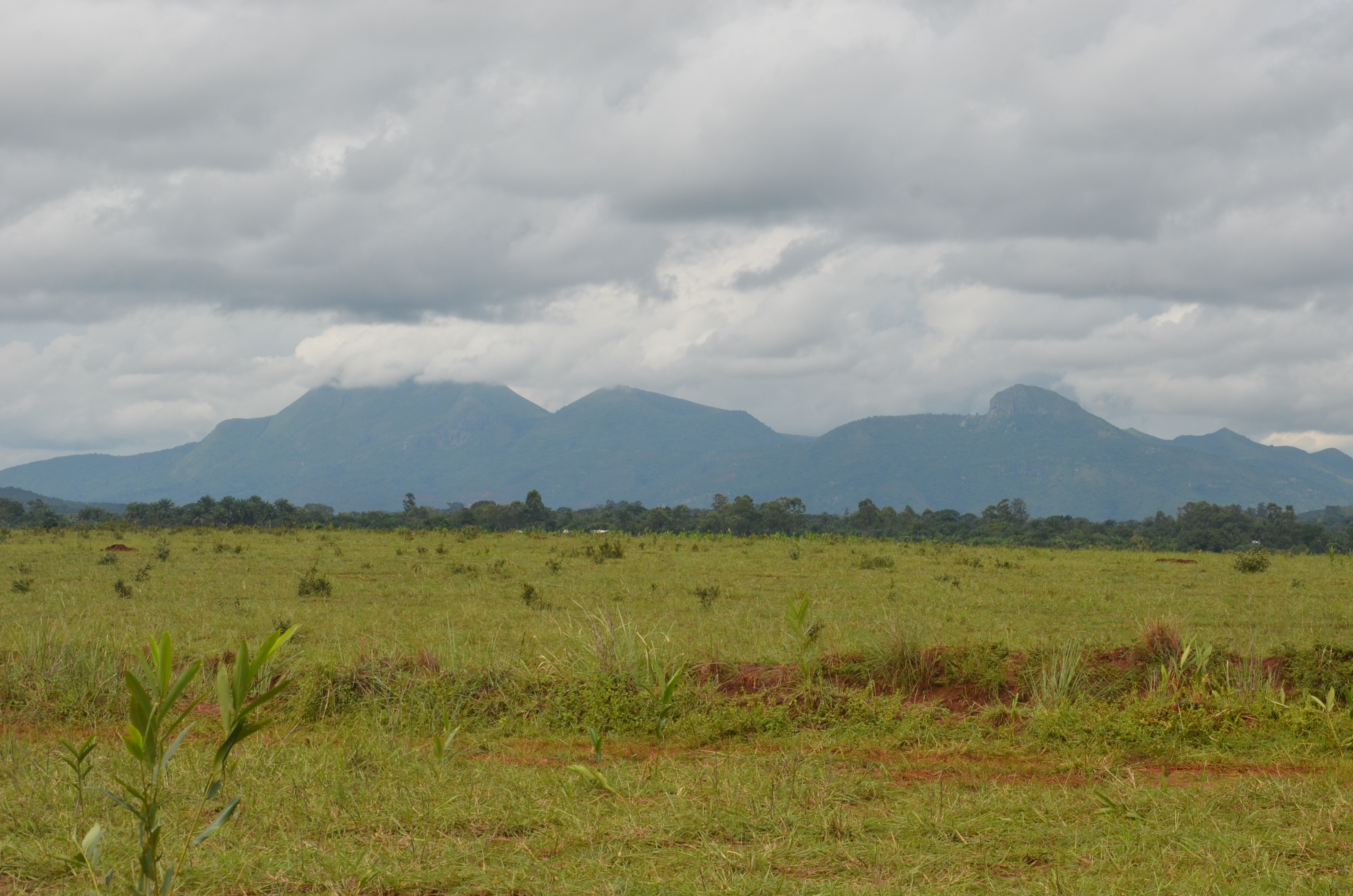 Dans les alentours du montagne du lac de cratère à Koutaba dans le noun, à l'Ouest du Cameroun